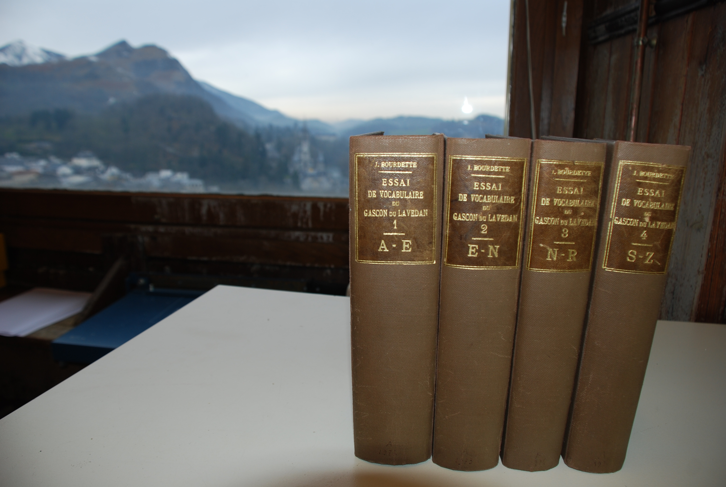 Les 4 tomes du manuscrit de Jean Bourdette, Essai du vocabulaire du gascon de Lavedan, conservé au Musée Pyrénéen, Château fort de Lourdes, France